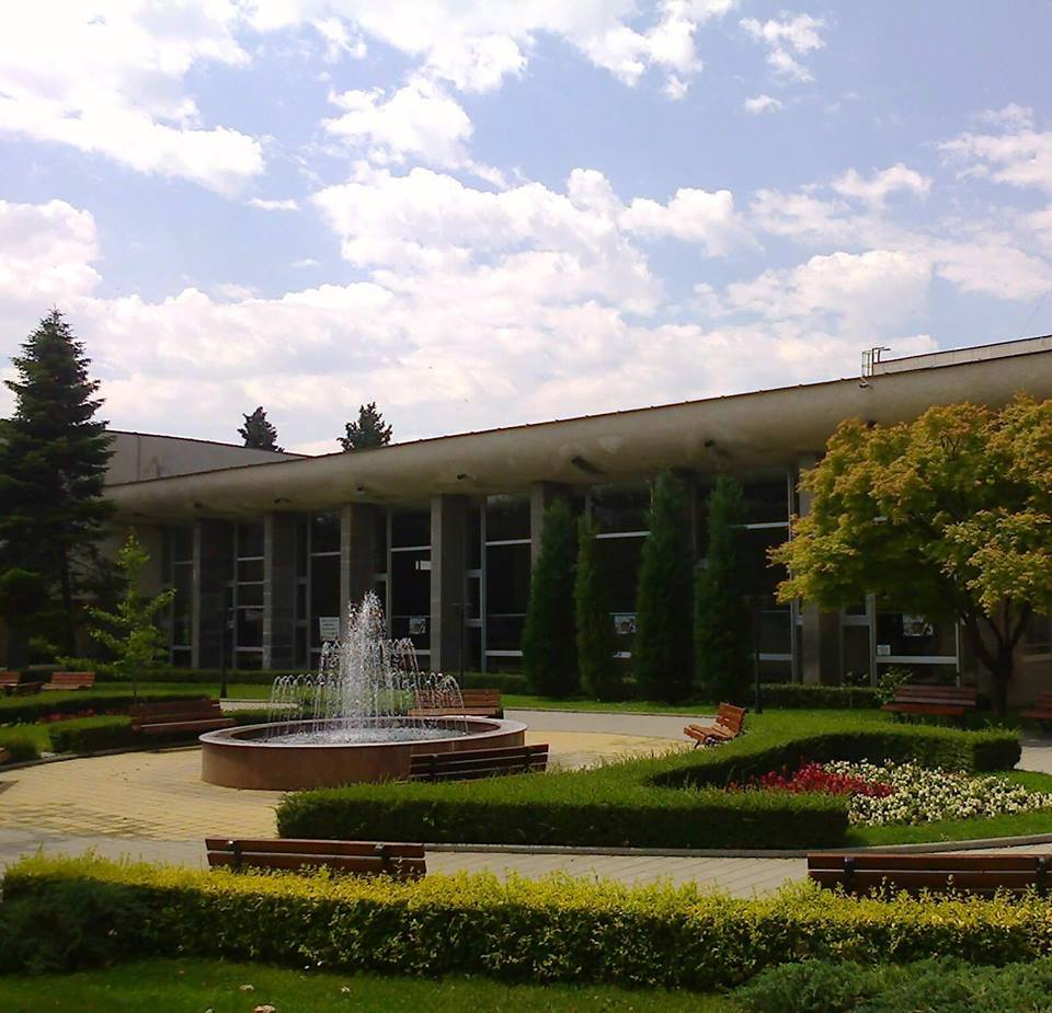 Народно читалище "Иван Вазов - 1904" Хисаря